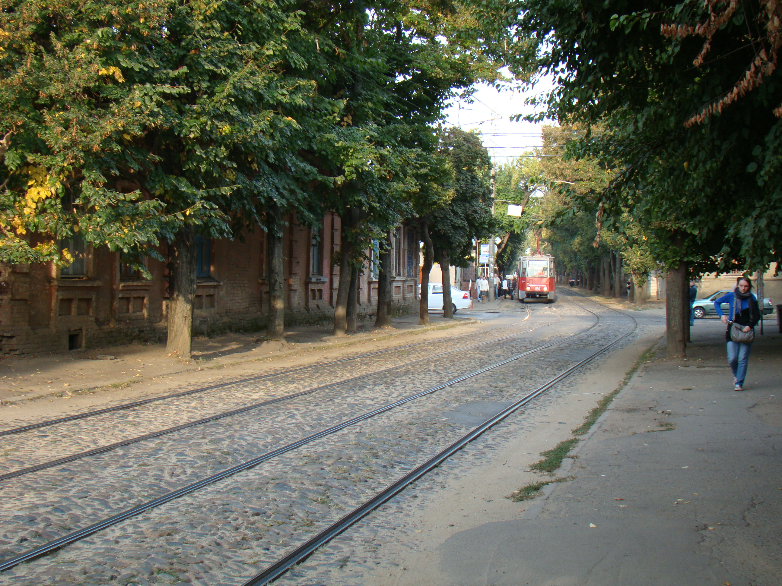 Улица Гоголя, Краснодар